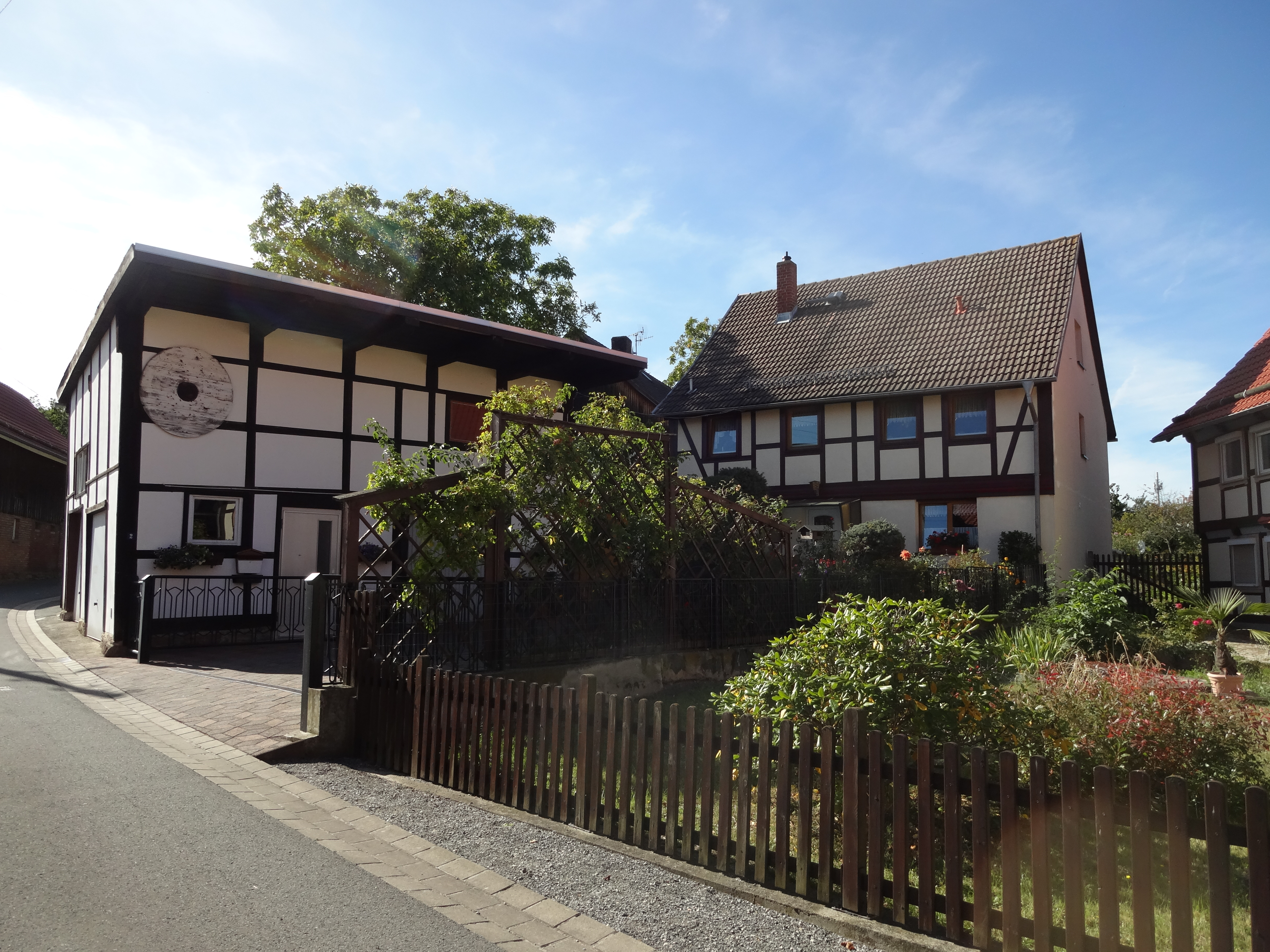 Wohnhaus in der Backhausgasse 2 in Drübeck; das Gebäude war denkmalgeschützt